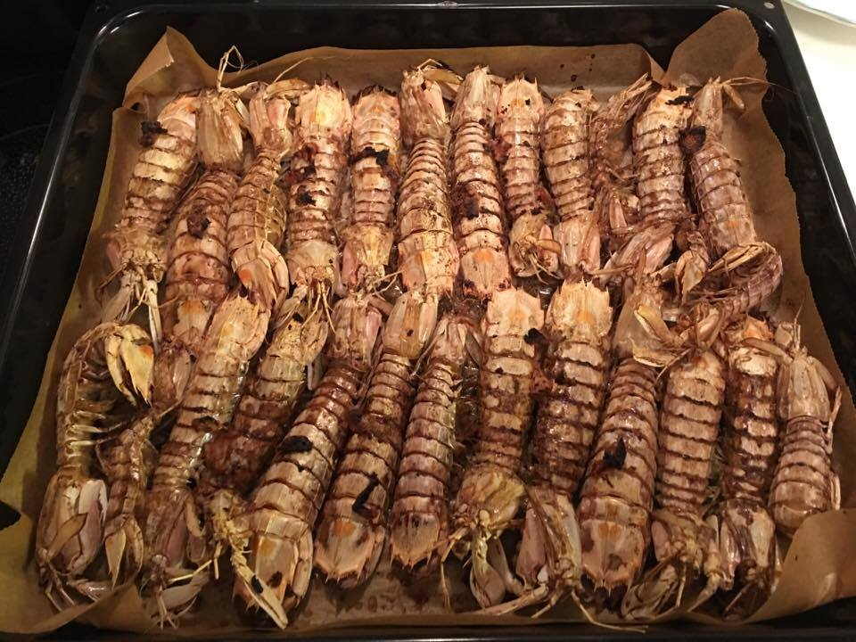 Squilla mantis im Ofen zubereitet